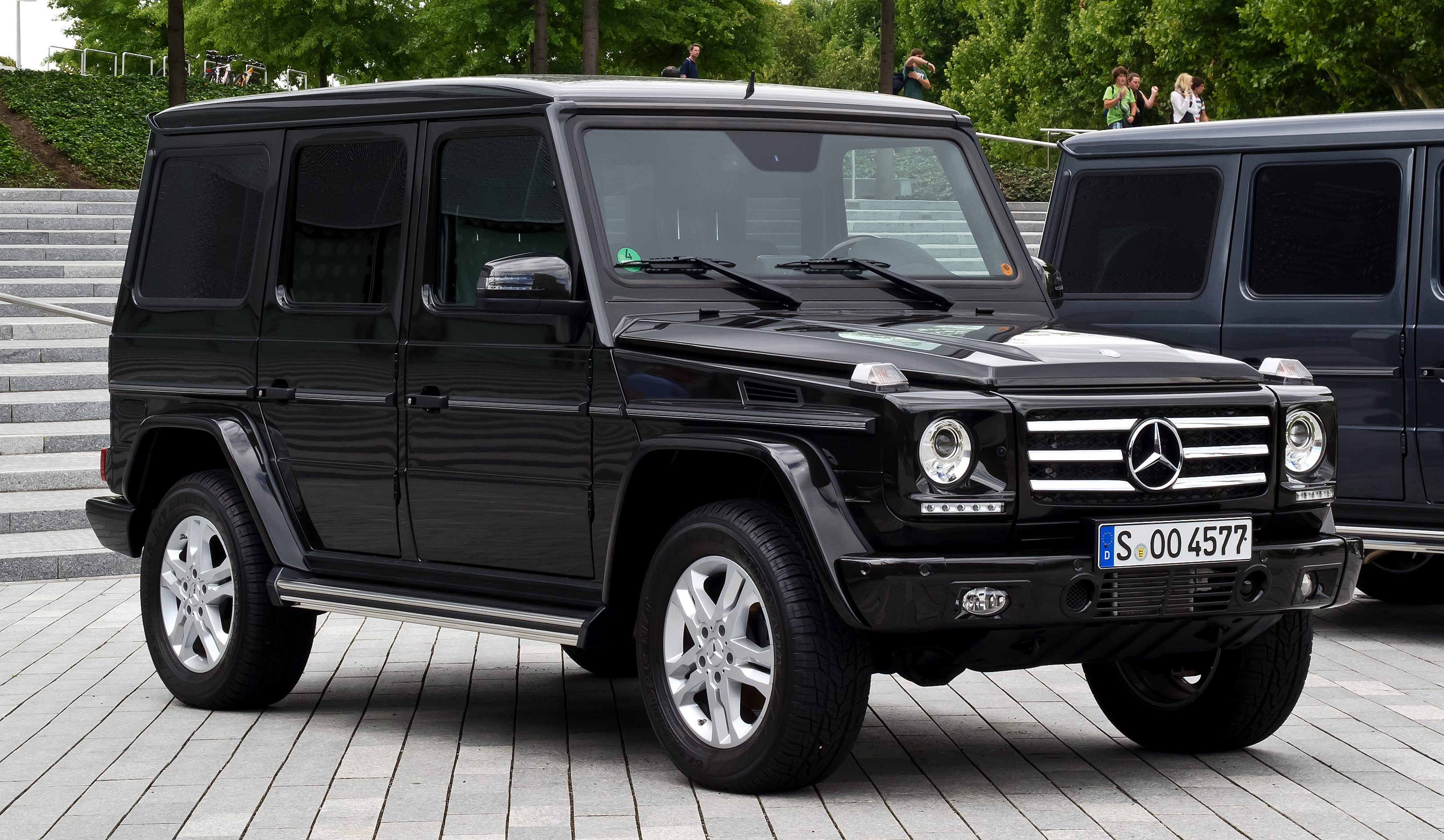 Mercedes-Benz G 350 BlueTEC (W 463, 3. Facelift)